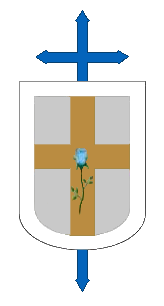 Escudo de la Diócesis de Maracay. Estado Aragua. Venezuela El escudo de la Diócesis de Maracay ostenta la forma de los blasones españoles, en recuerdo de Don Diego de Baños y Sotomayor, promotor de la creación de la Parroquia del Valle de Maracay. Sobreun único cuartel en blanco un ramillete de flores de lis en color plata rodeando una cruz dorada. Las flores de lis, o lirios heráldicos, representan a San José, Protector del Redentor, Jesucristo, simbolizado en la cruz de oro. San José es Patrono de la ciudad episcopal, y está presente en ella desde su génesis. Es también Patrono de la Diócesis. En la parte baja del cuartel, unas ondas en azur (azul) significan el agua del bautismo, sacramento que abre las puertas de la vida eterna. Simbolizan también el Lago de los Tacariguas, en cuyas márgenes se asentaron los primeros habitantes de la región. Una estrella al extremo superior derecho, al saliente, simboliza a María Virgen, veneradabajo el título de Nuestra Señora de Belén. La bordura en sínople(verde) que bordea al escudo recuerda a las iglesias madres de Maracay: Caracas, con su majestuoso Ávila, y Calabozo, con su llanura ilimitada. Esta bordura lleva superpuestas ocho cruces doradas, símbolo de los ocho arciprestazgos que conforman la Diócesis. Corona el escudo la cruz episcopal y debajo, en una cinta de color plata, aparece el lema Redemptoris Custos, que hace referencia a la tarea que el mismo Dios encargó a San José.